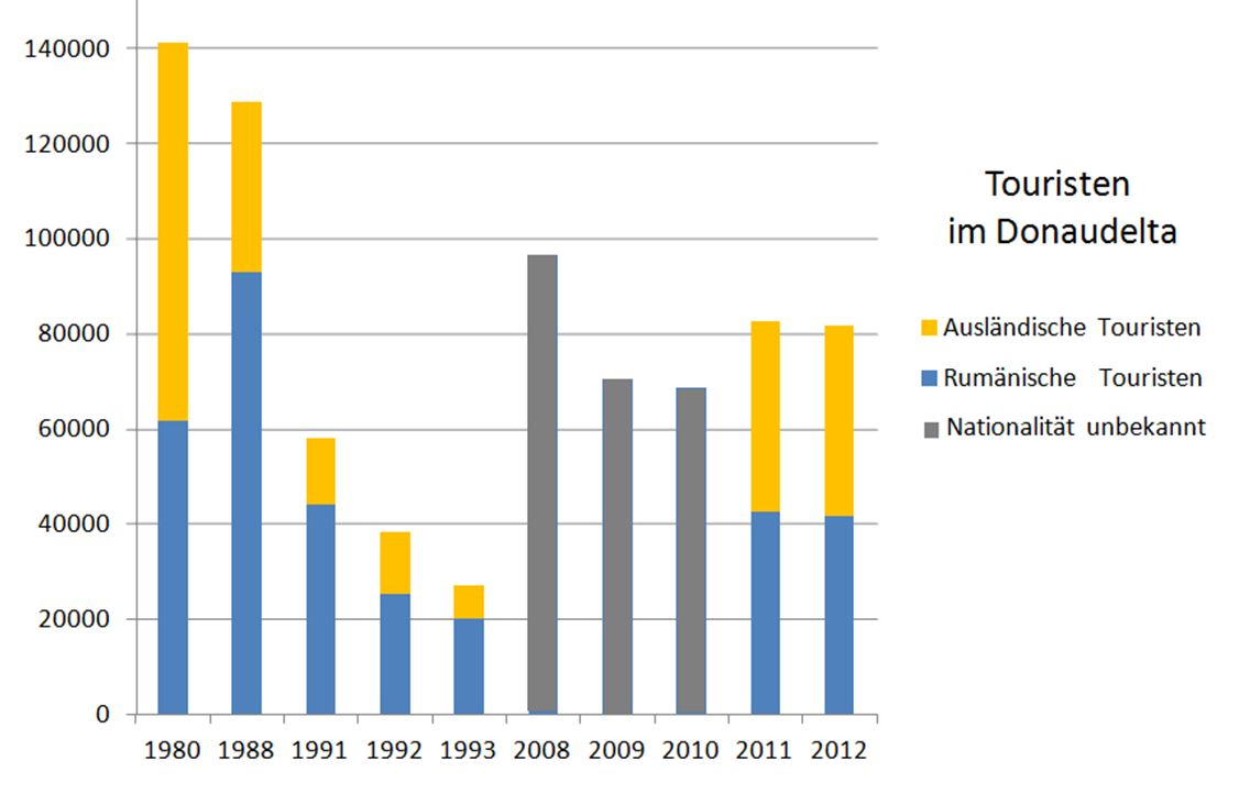 Touristenzahlen im Donaudelta (1980-2012)